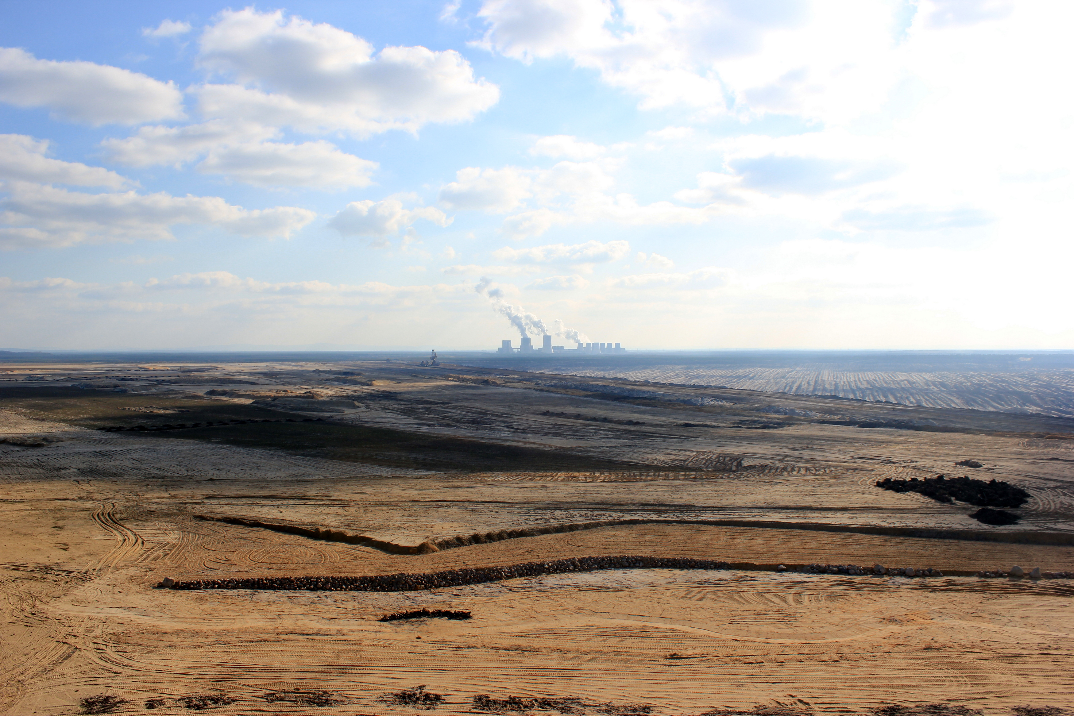 Hornjoserbsce: Napohlad něhdyšeje Wochožanskeje jamy wot rozhladneje wěže pola Běłeje Wody.